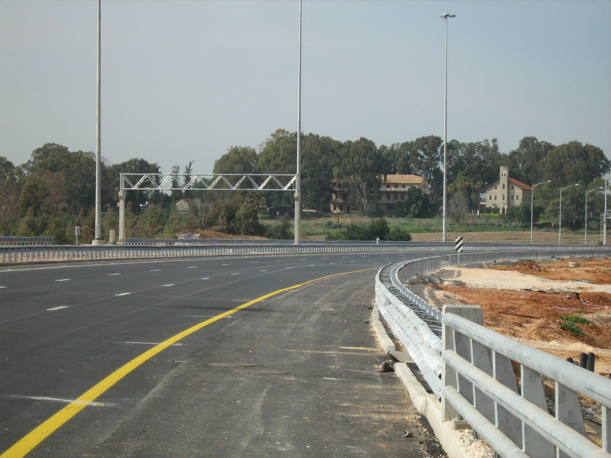 כביש 431 מראה לעבר נצר סרני